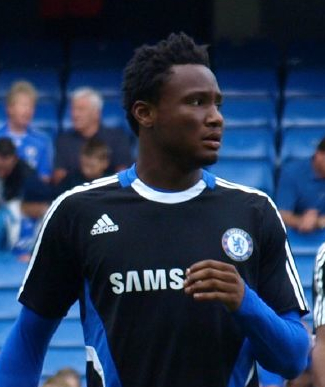 Nigerian footballer John Obi Mikel